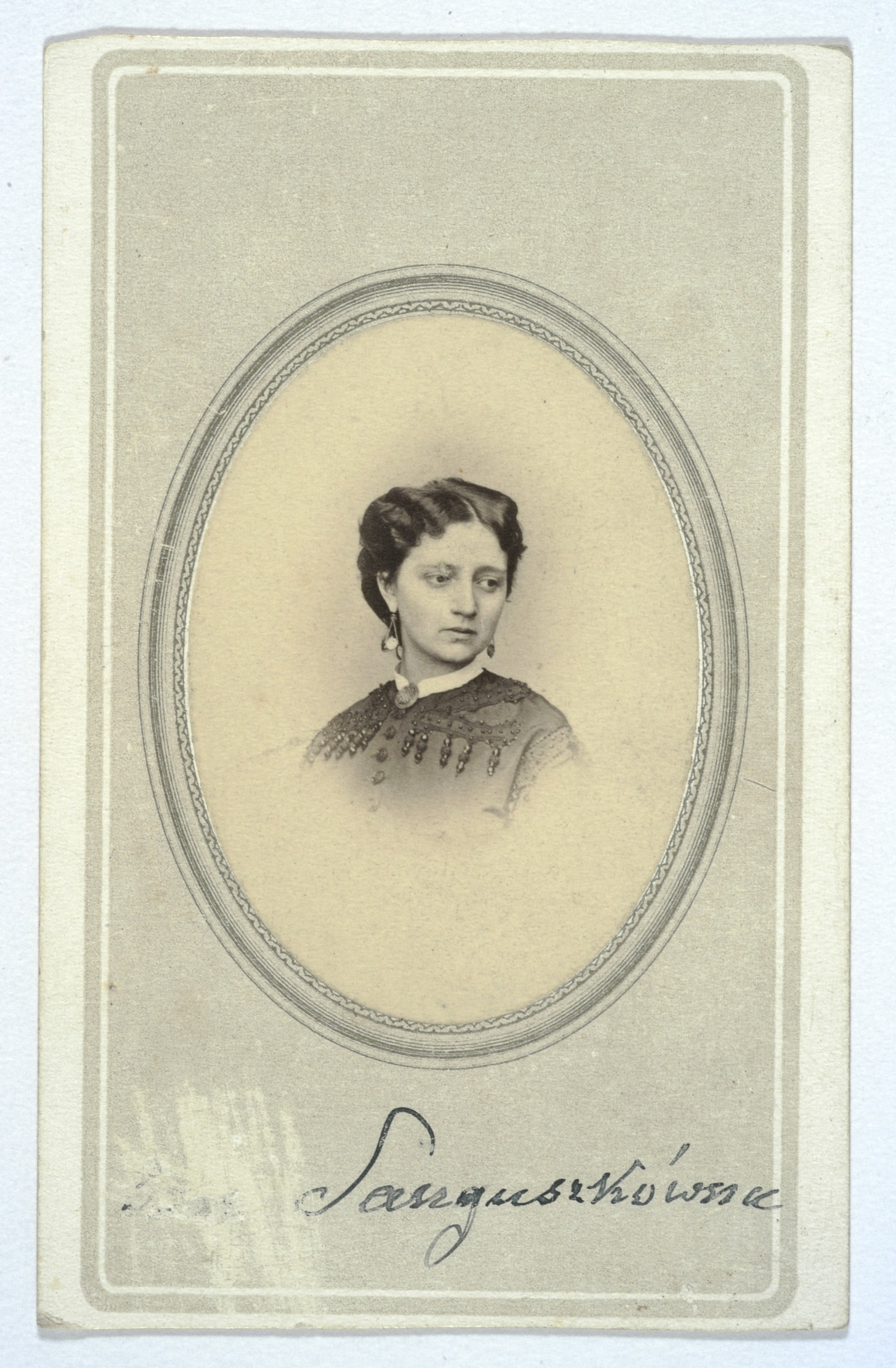 Portret księżniczki Heleny Sanguszkówny (Walery Rzewuski)